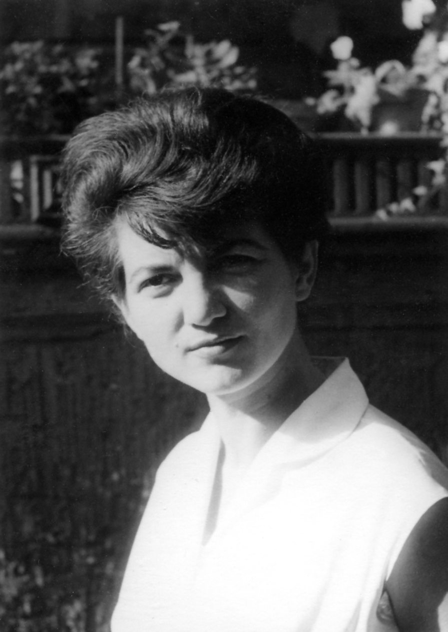 Sabine Krug, 1961, privat